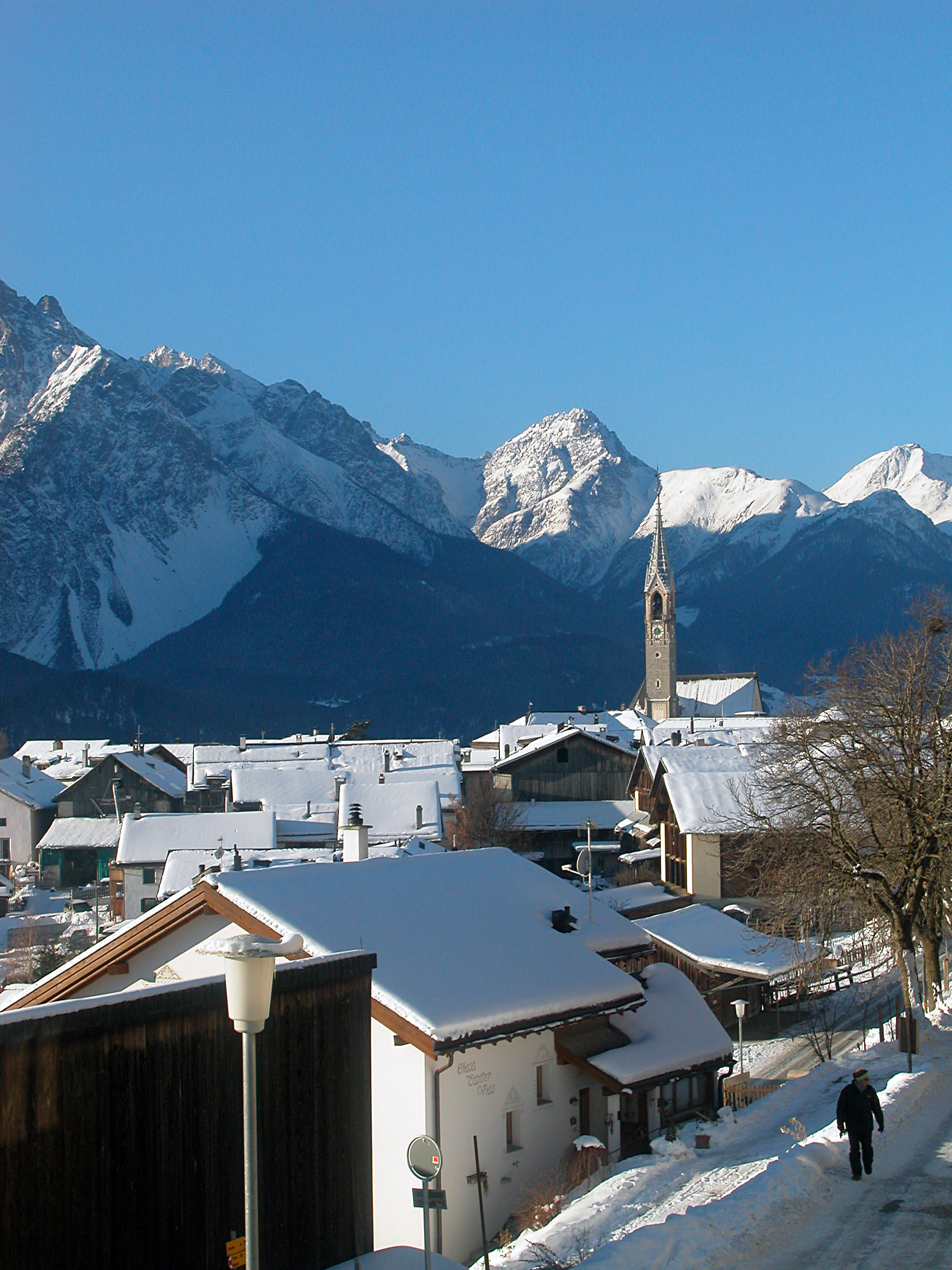 Die Schweizer Gemeinde Sent im Kanton Graubünden Fotograf: Umbricht, 2005 Quelle: eigene Aufnahme, Februar 2005 Lizenzstatus: GNU FDL